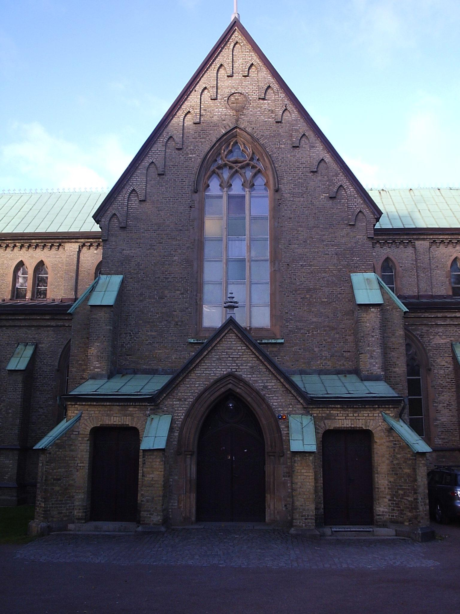 Hagakyrkan i Göteborg, den 26 oktober 2005. Bilden är fotograferad av Harri Blomberg.